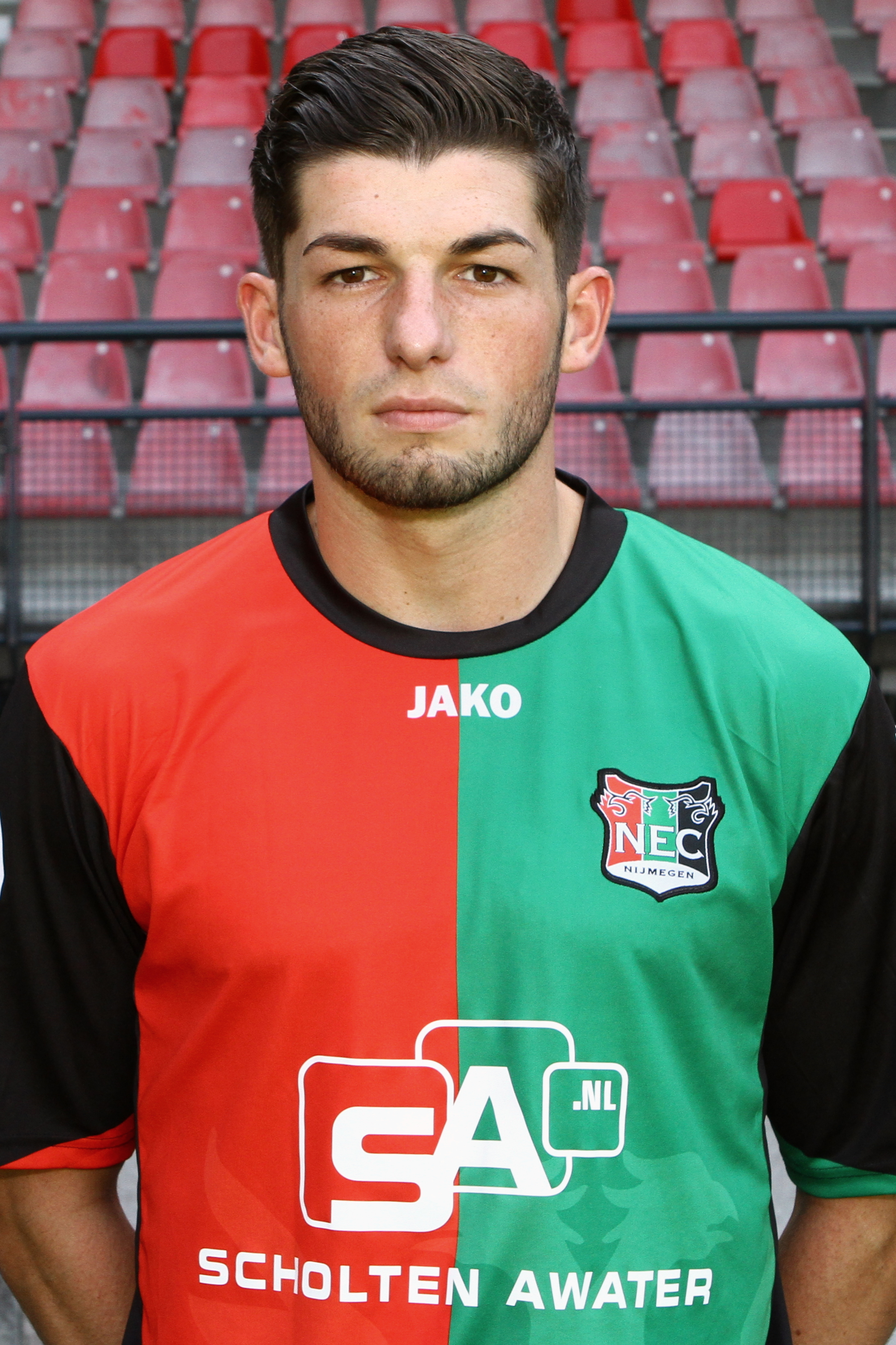 Marcel Stutter tijdens spelers presentatie NEC seizoen 2013-2014 spelersportret liggend